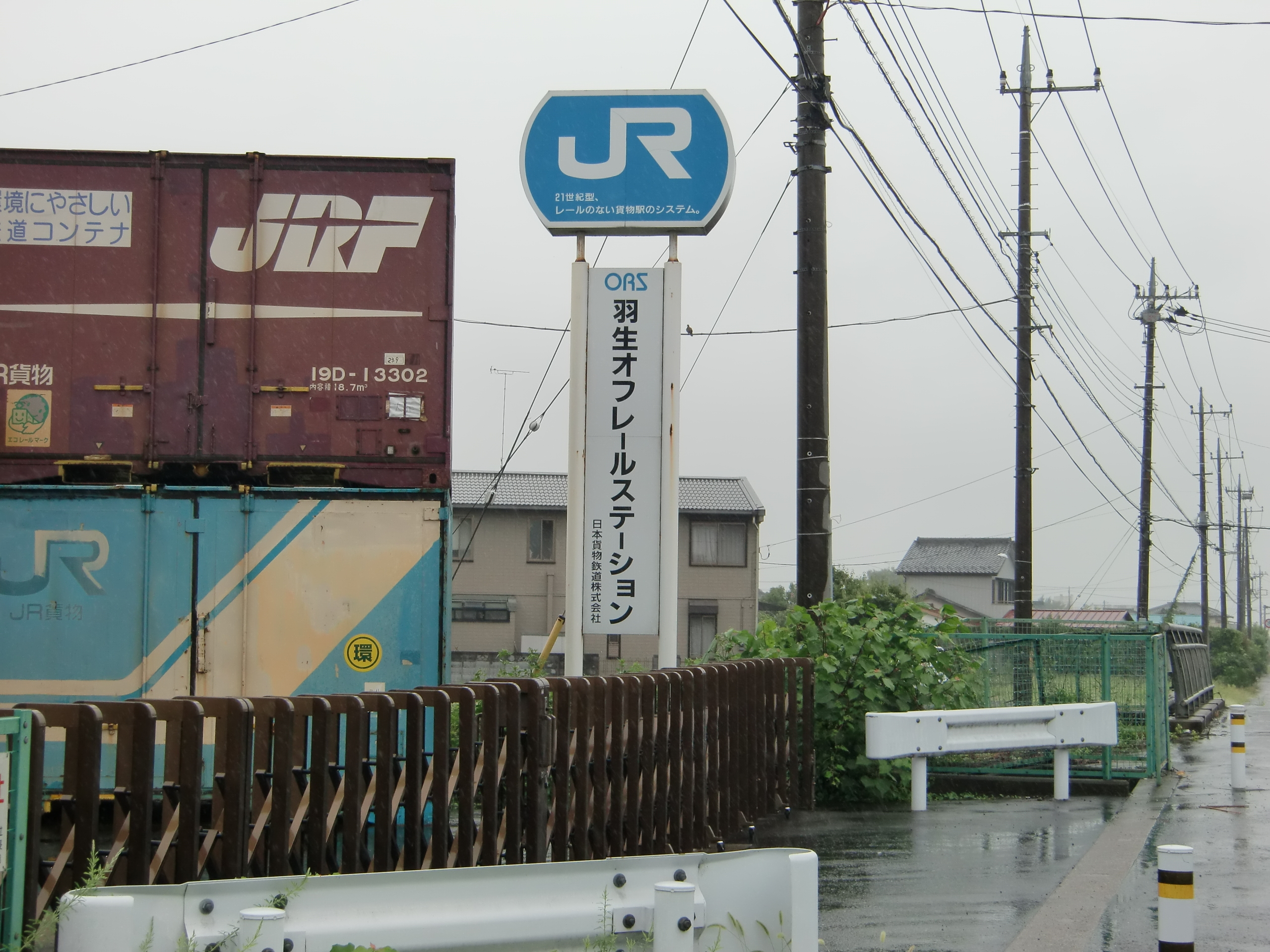 埼玉県／羽生市内のJR貨物・羽生レールオフ・ステーションの、公道沿いに建つ看板。 コンテナ駅が設置できない地域をカバーする、地方のコンテナデポ的な施設。